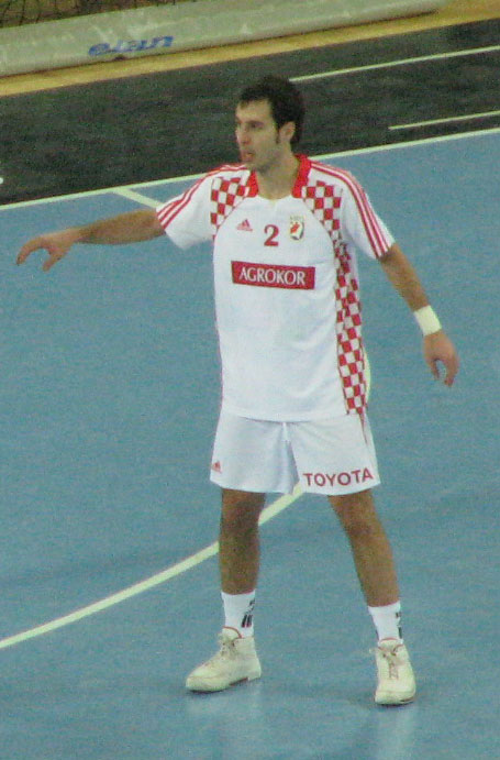 Mateo Hrvatin